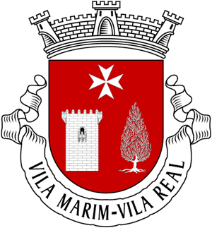 Brasão da freguesia de Vila Marim (concelho de Vila Real)